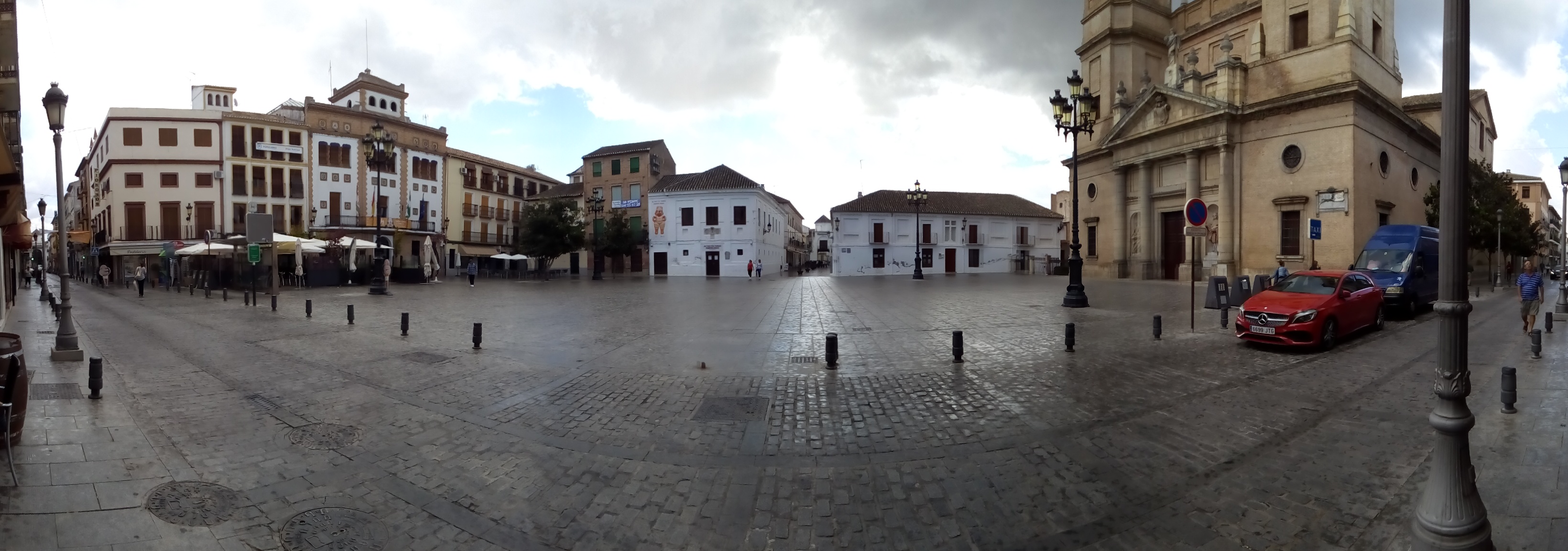 Santa Fe (Granada), plaza del ayuntamiento, panorámica